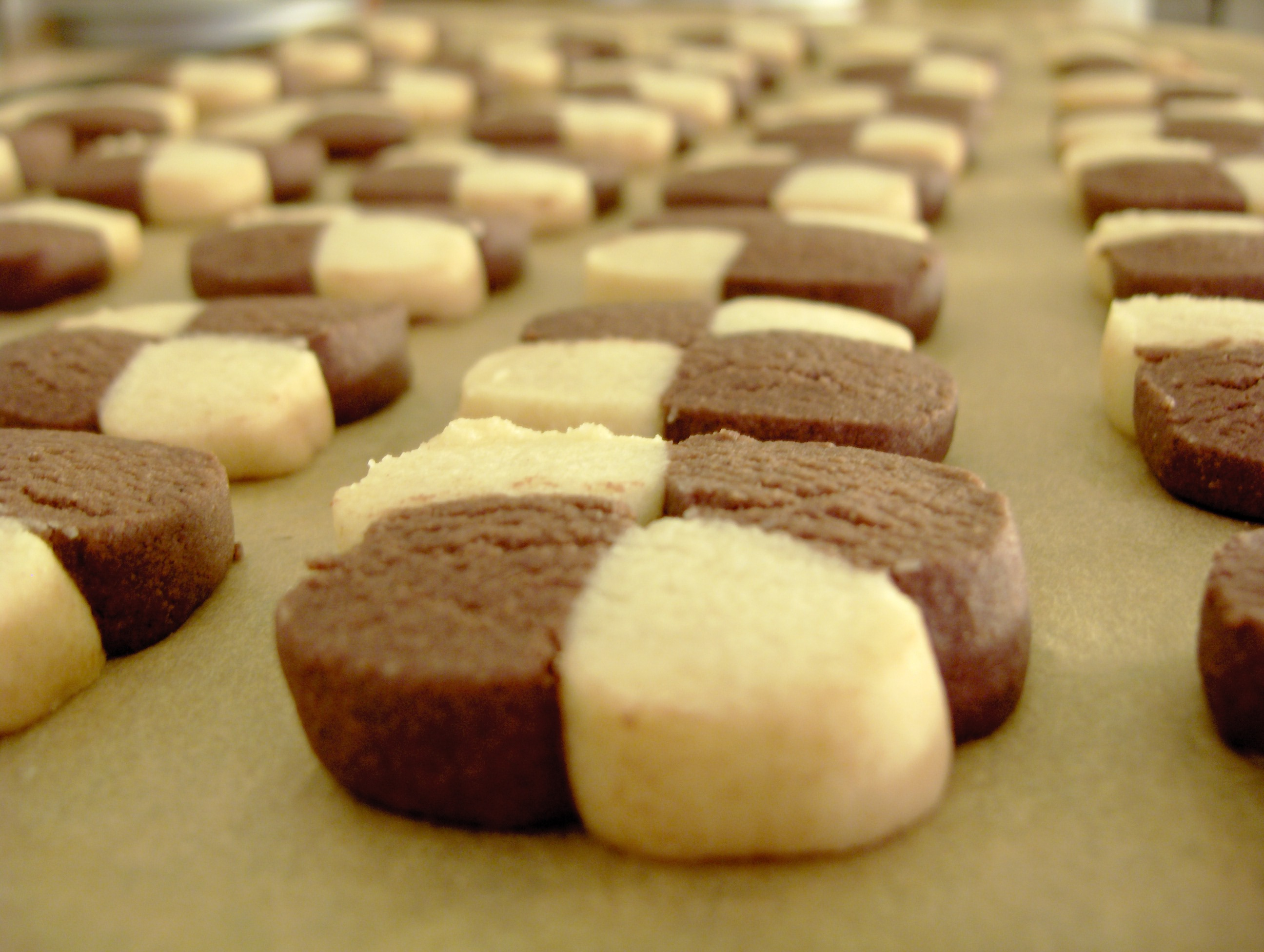 Schackrutor, en sorts kaka (receptet kommer från "Sju sorters kakor").